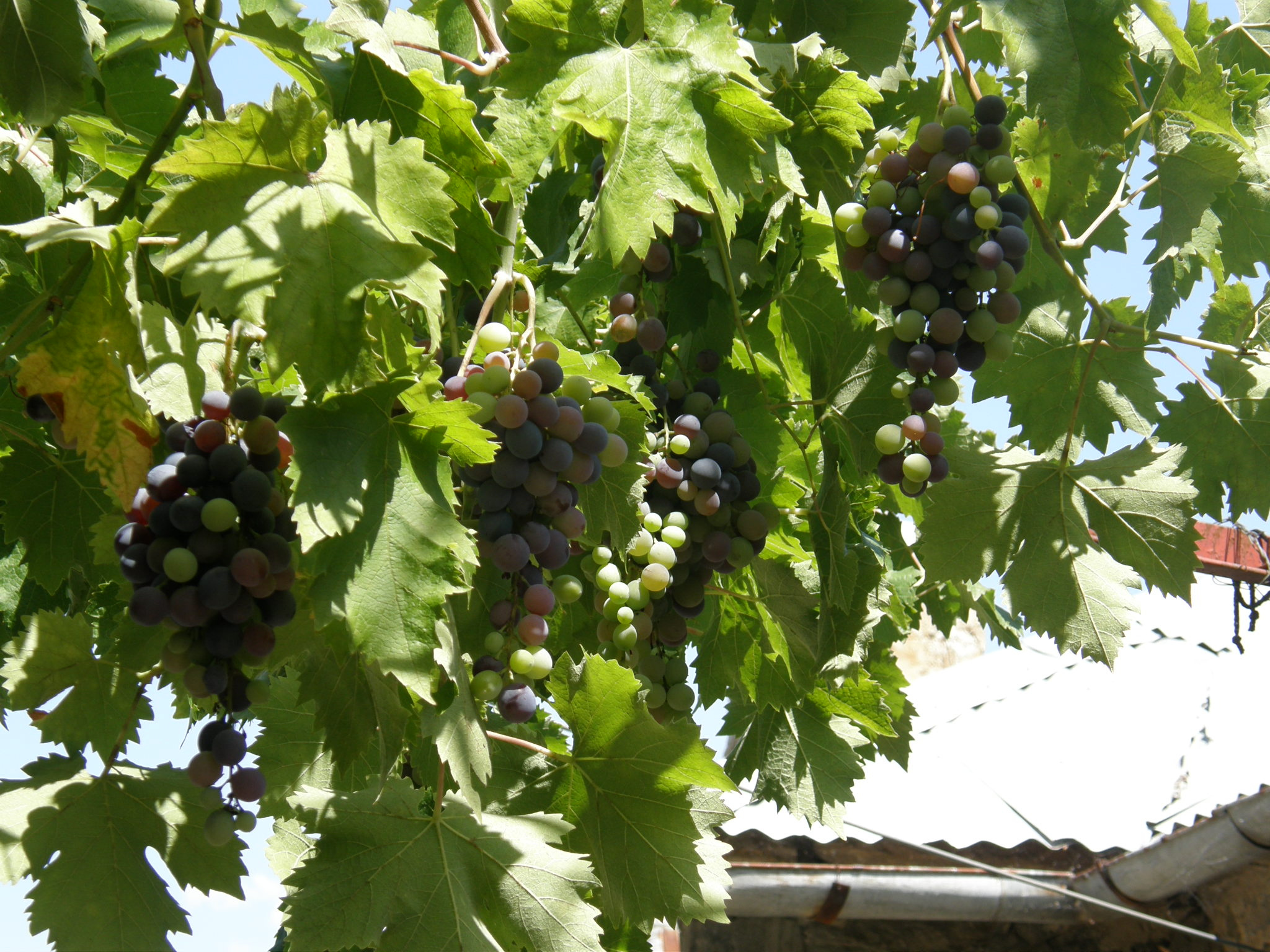 Κληματαριά σε αυλή στο χωριό Μοναστήρι Ιωαννίνων